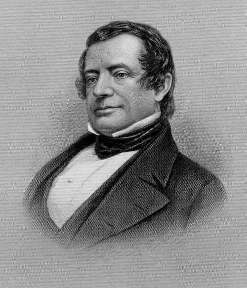 Washington Irving licence